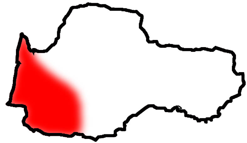 Pichòta mapa del dialecte gascon Little map of gascon dialect